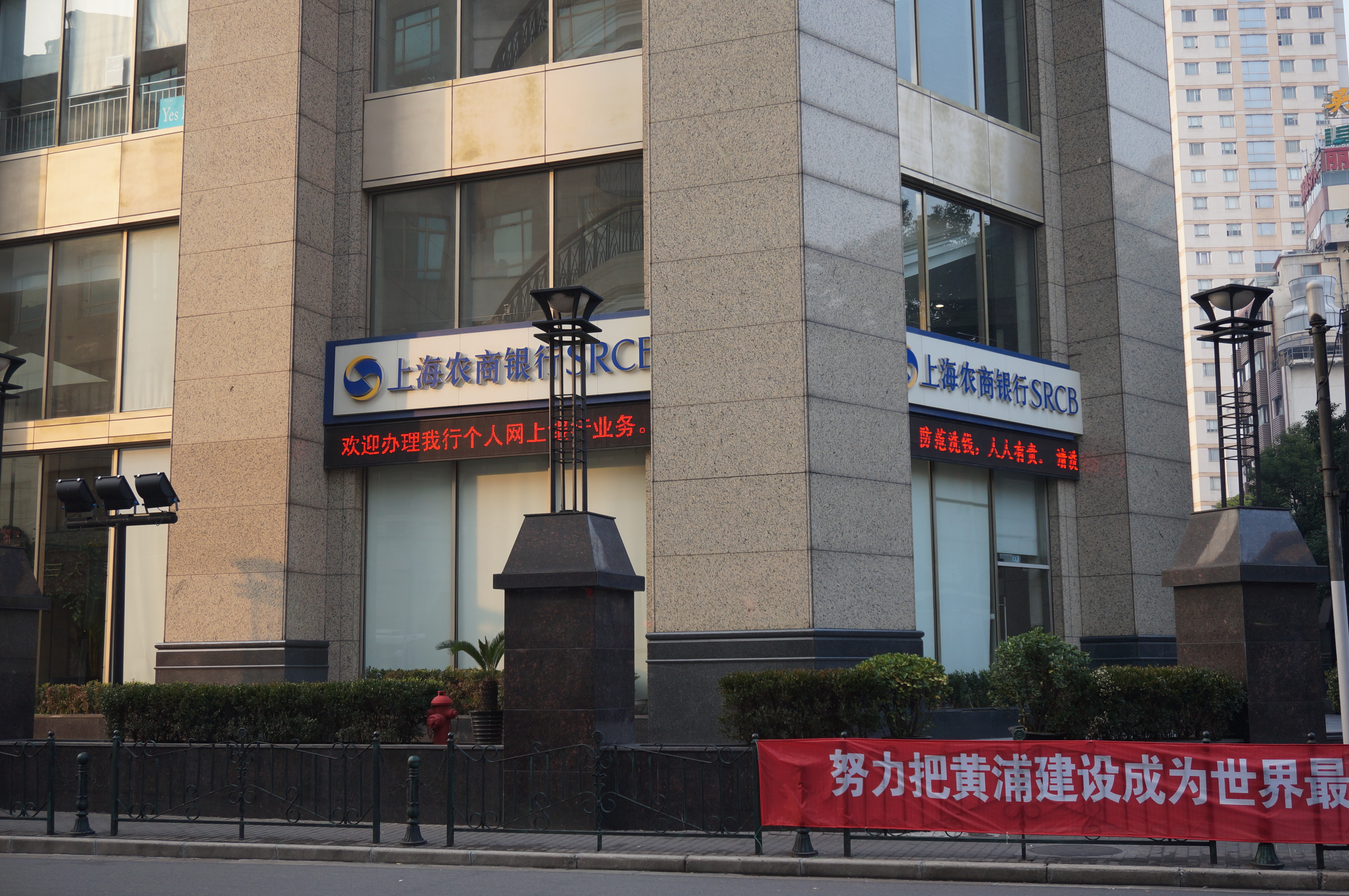 上海农村商业银行的一家支行